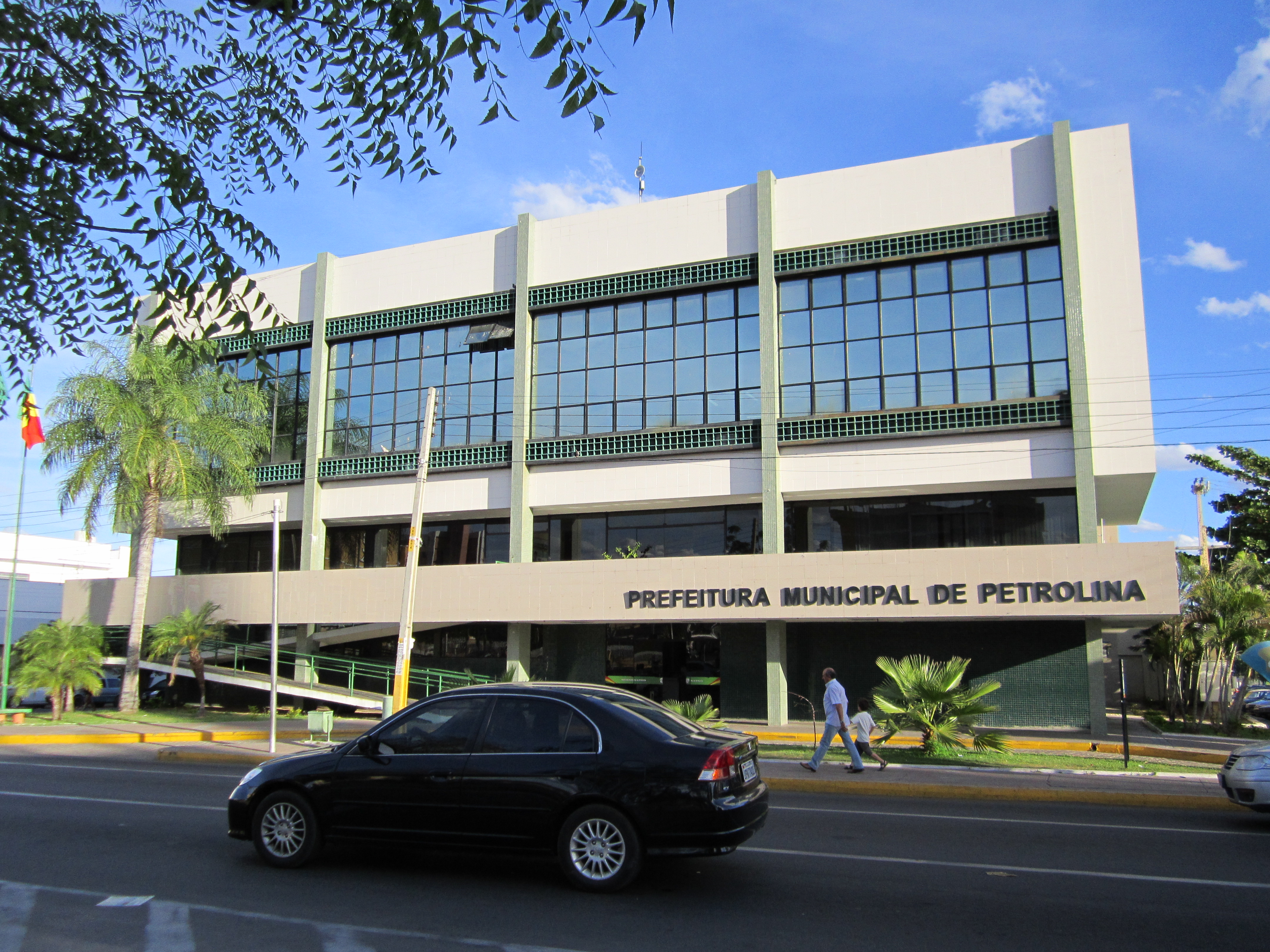 Prefeitura Municipal - Petrolina, Pernambuco, Brasil